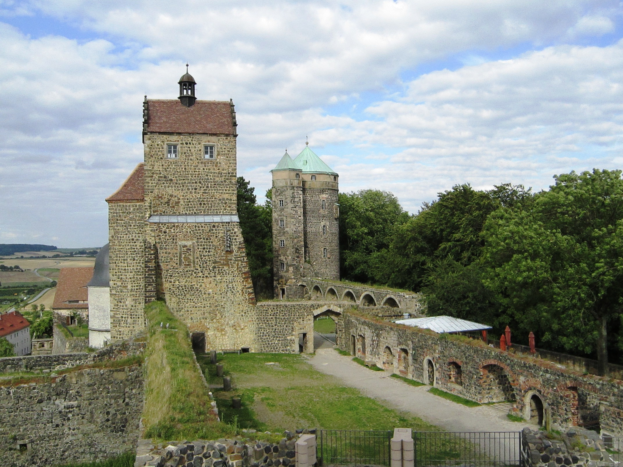 Slot Stolpen (Saksen) Duitsland